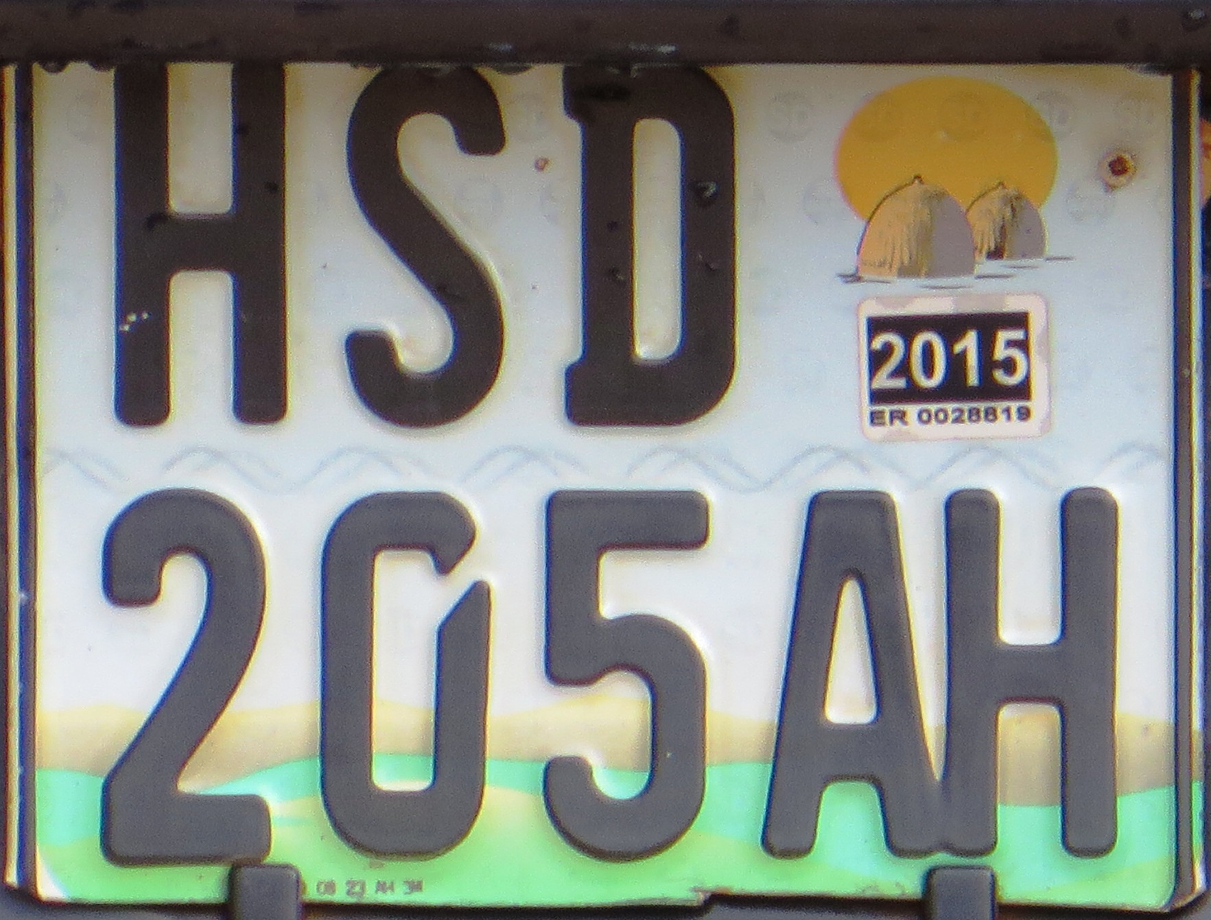 Swaziland kentekenplaat